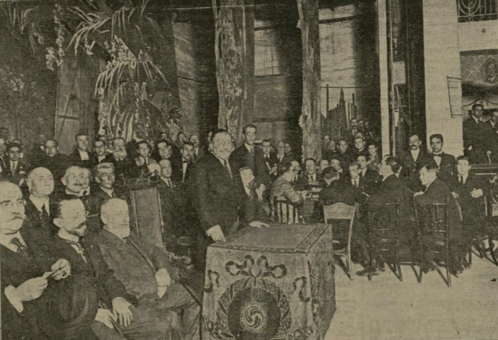 Conferencia en el teatro Goya de Barcelona de Juan Vázquez de Mella (1921)